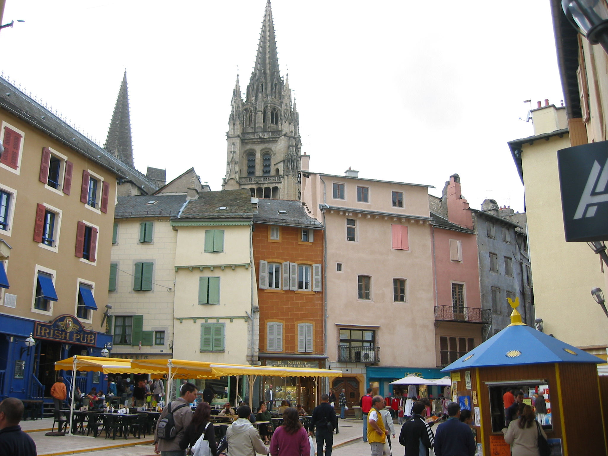 Mende (Lozère, France) - Place de la république.